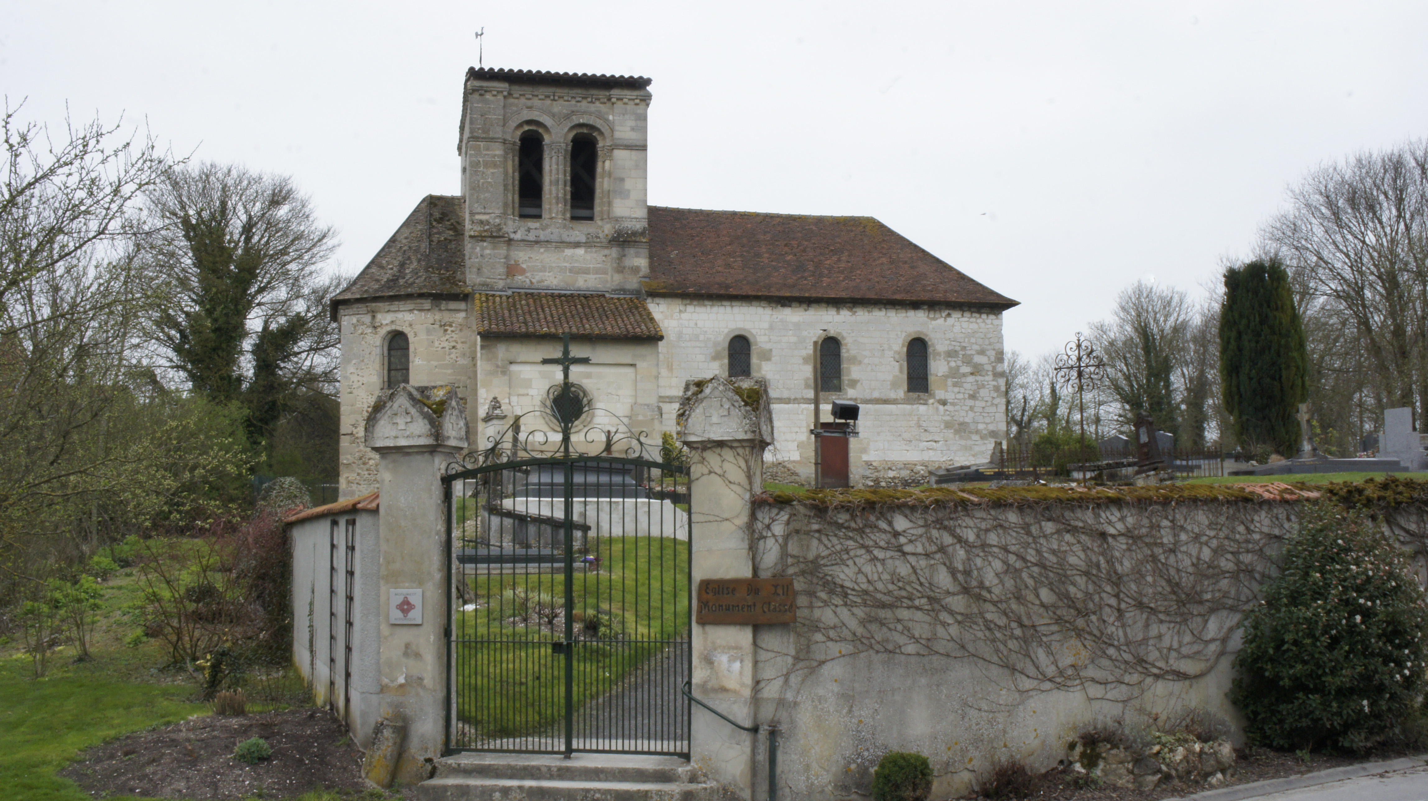 Église_dédiée à Memmie entourée du cimetière .